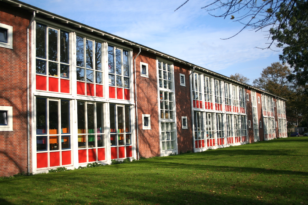 H-school Slootermeerschool, Burgemeester Fockstraat 85, Slotermeer. Foto: Erik Swierstra.